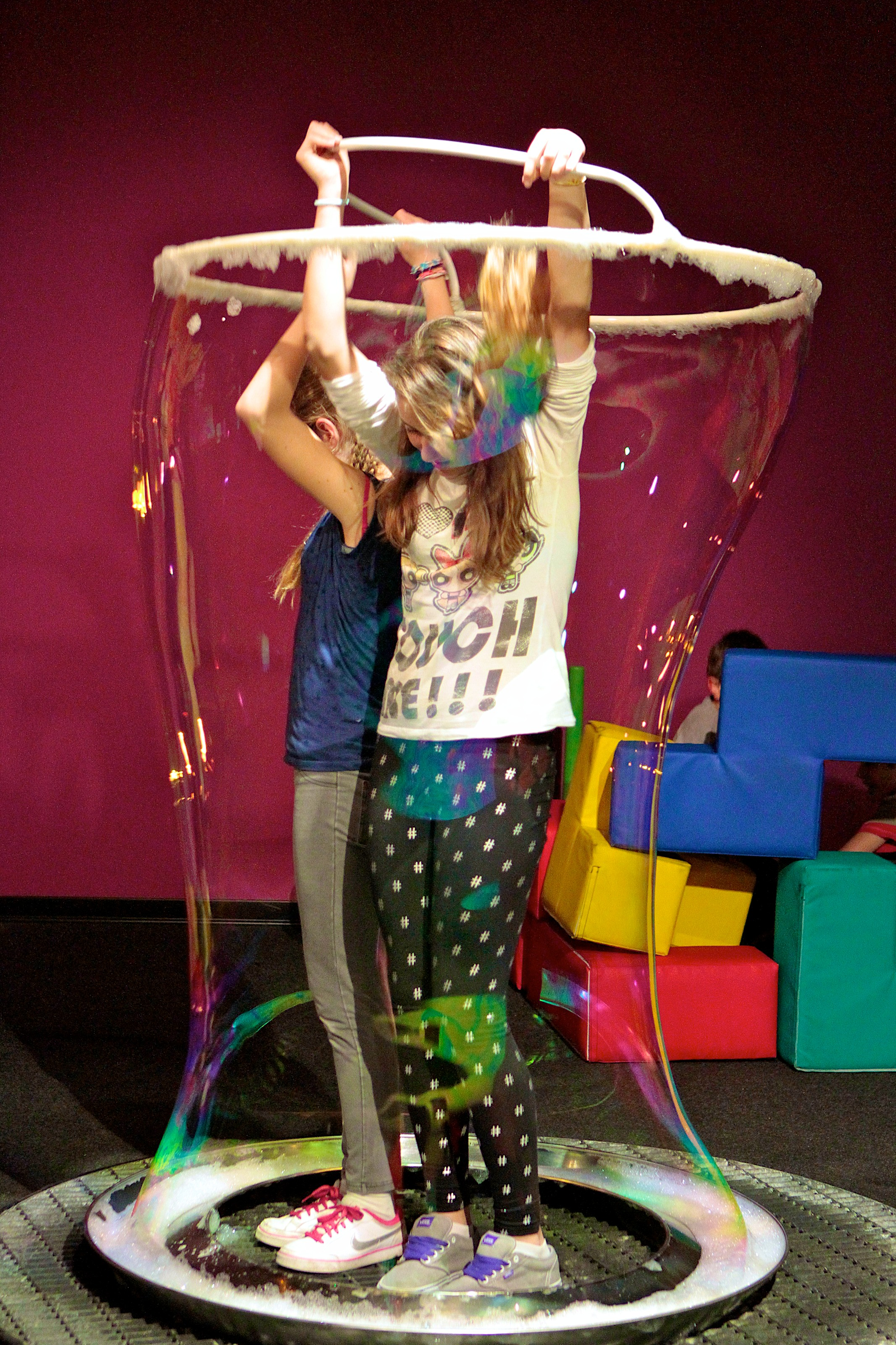 Uno degli "exhibit hands-on" dell'Immaginario Scientifico, sulle bolle di sapone